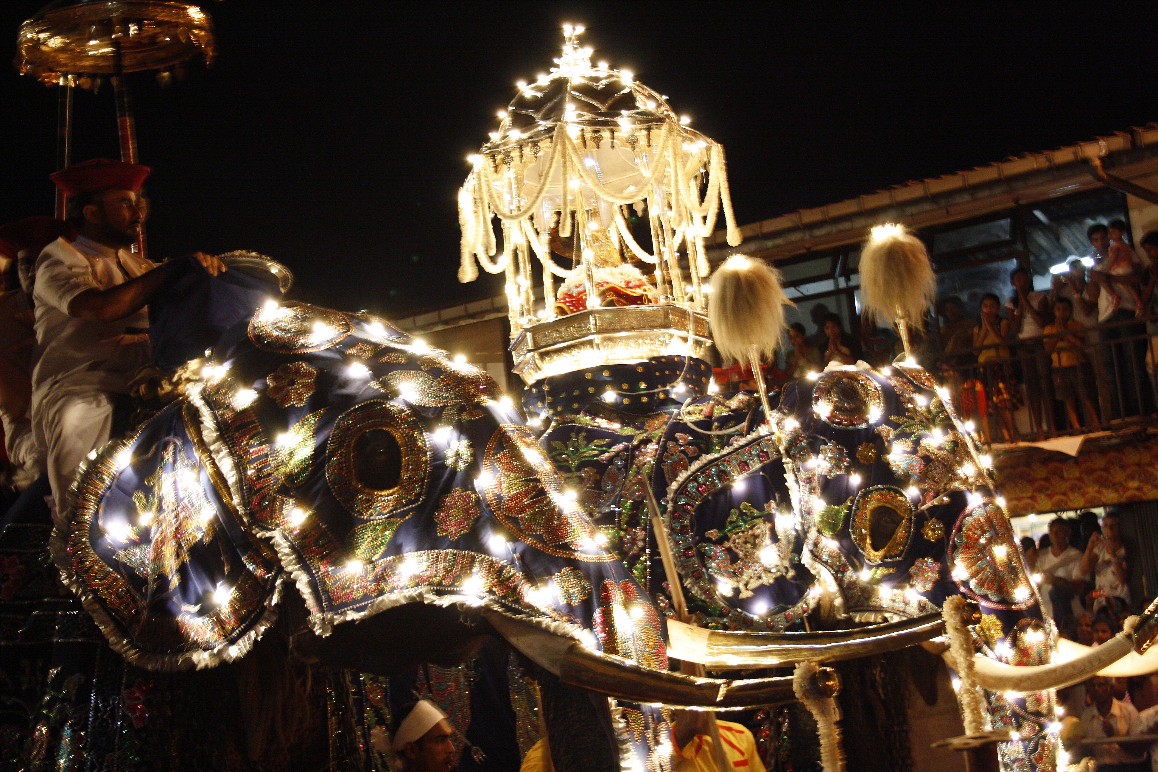 Éléphants caparaçonnés.